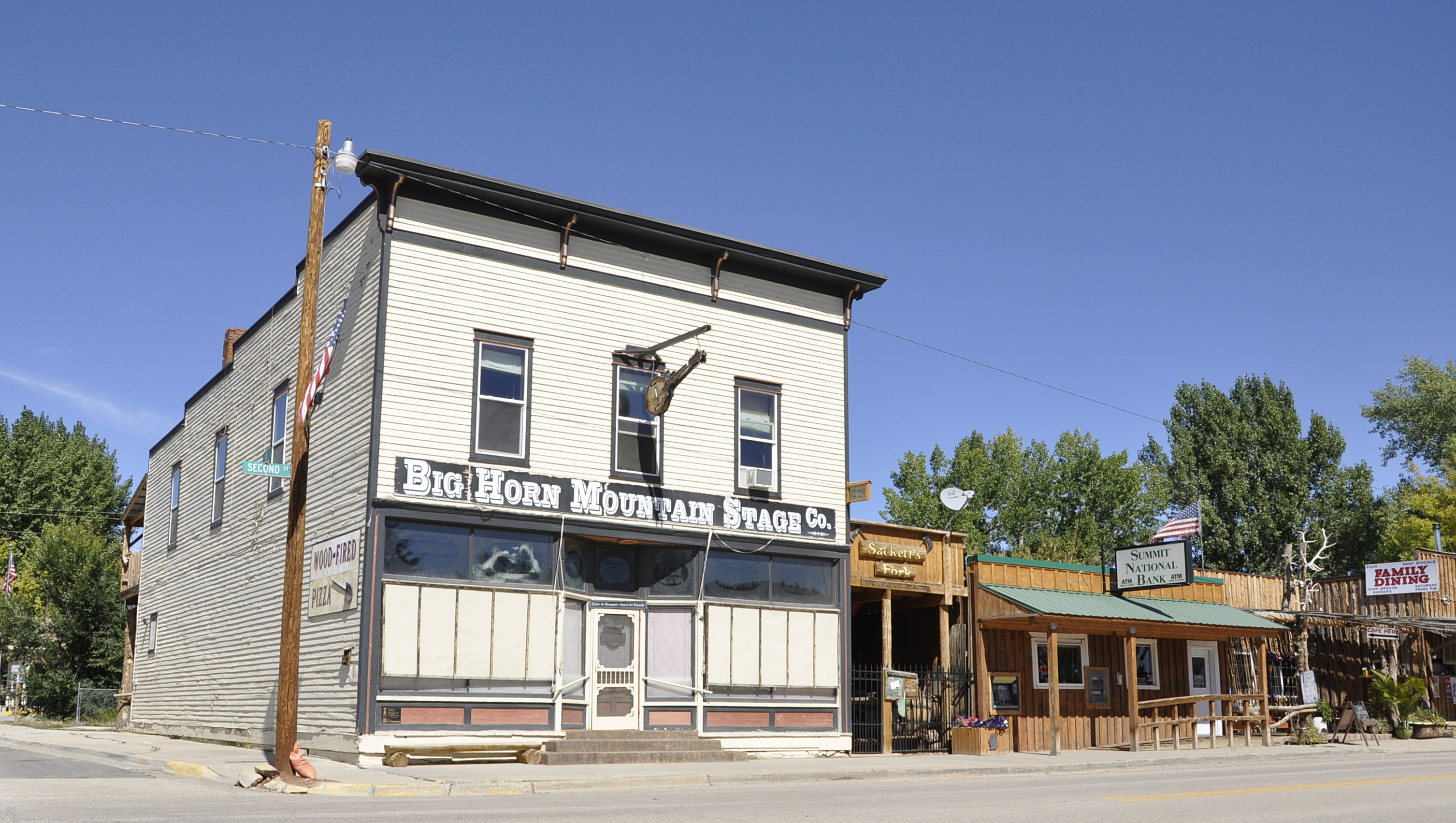 Ten Sleep, Wyoming. The pictured commercial building is listed on the National Register.